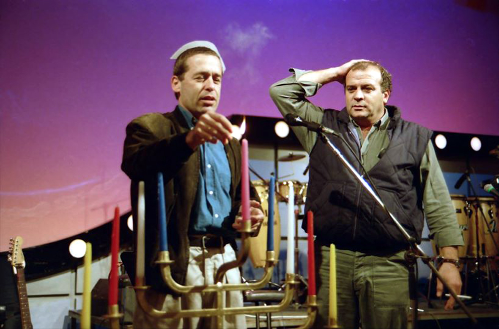 דני וסלי ובמאי הטלוויזיה בני כרמלי (במאי ראשי ב"רשת") בהדלקת נרות חנוכה במשרדי "רשת"